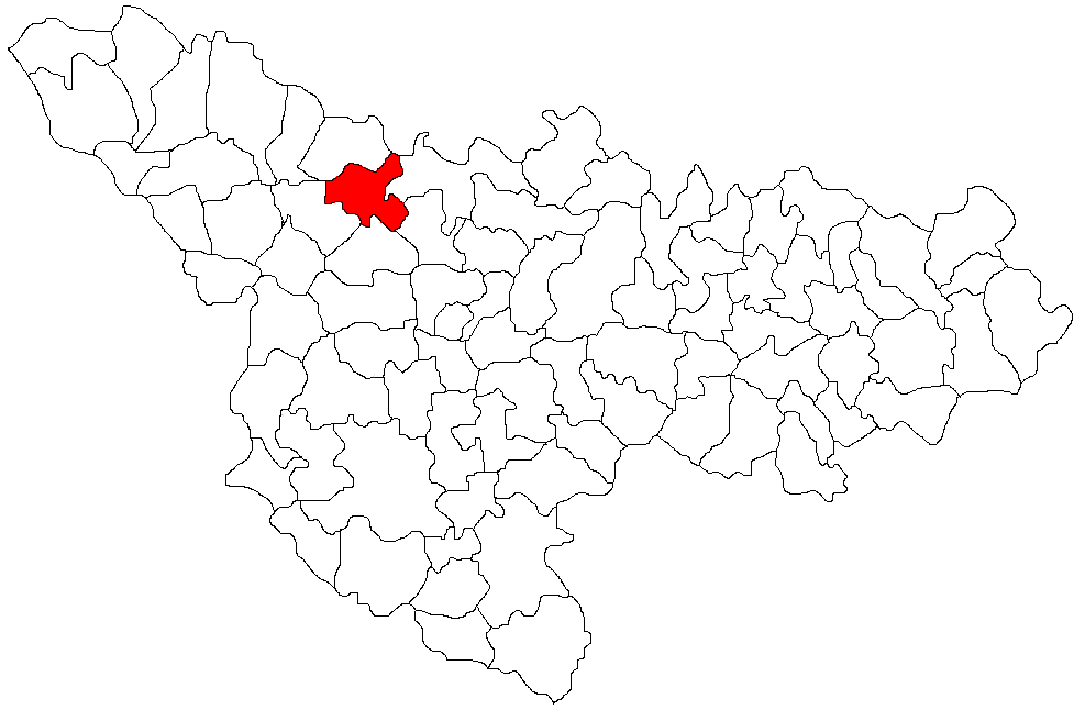 Satchinez, Timis Licensing Categorie:Hărţi ale judeţului Timiş